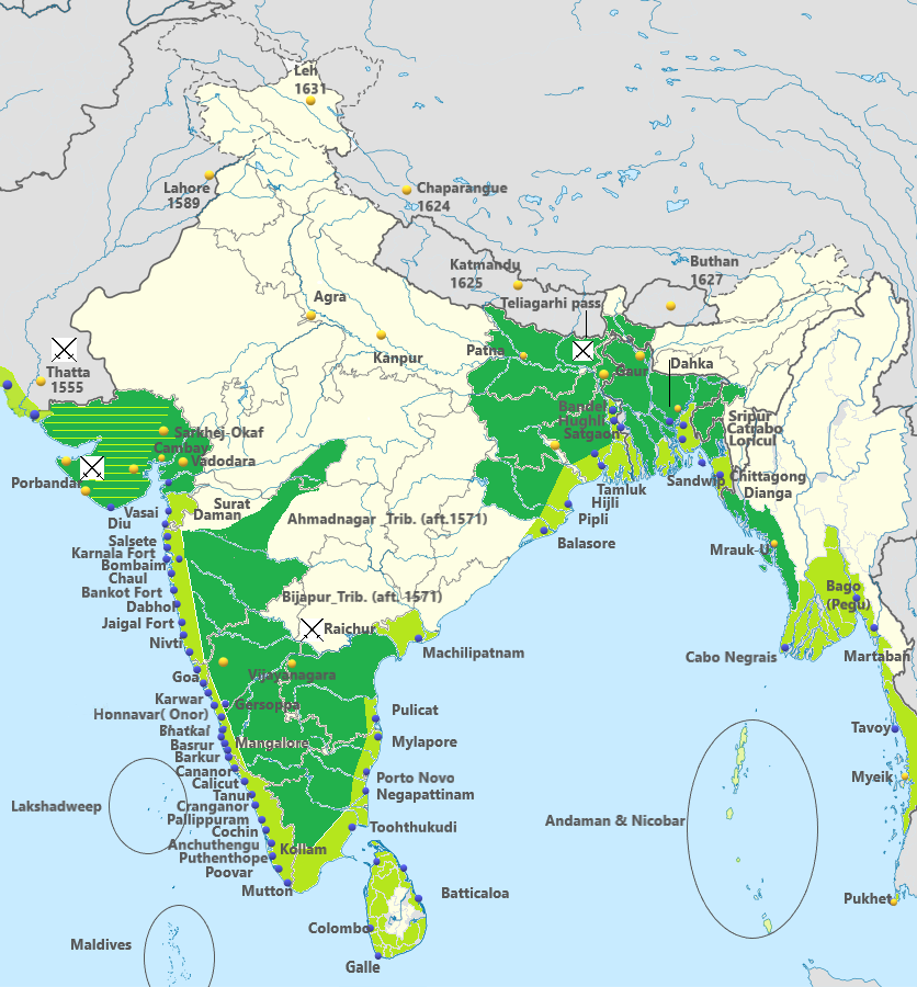 Mapa do Sudoeste Asiático